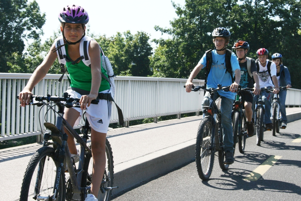 Auf dem Weg zur Schule, in Biel. Aktion bike2school von Pro Velo Schweiz.